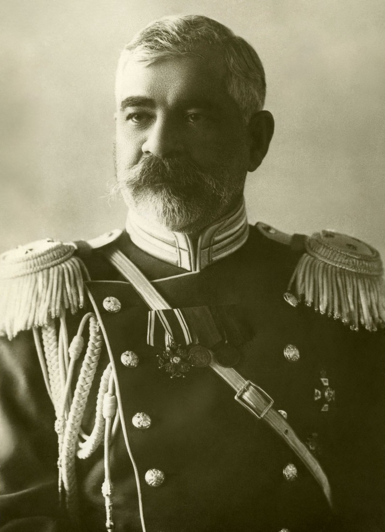 სიმონ ესაძე - ისტორიკოსი, გენერალი